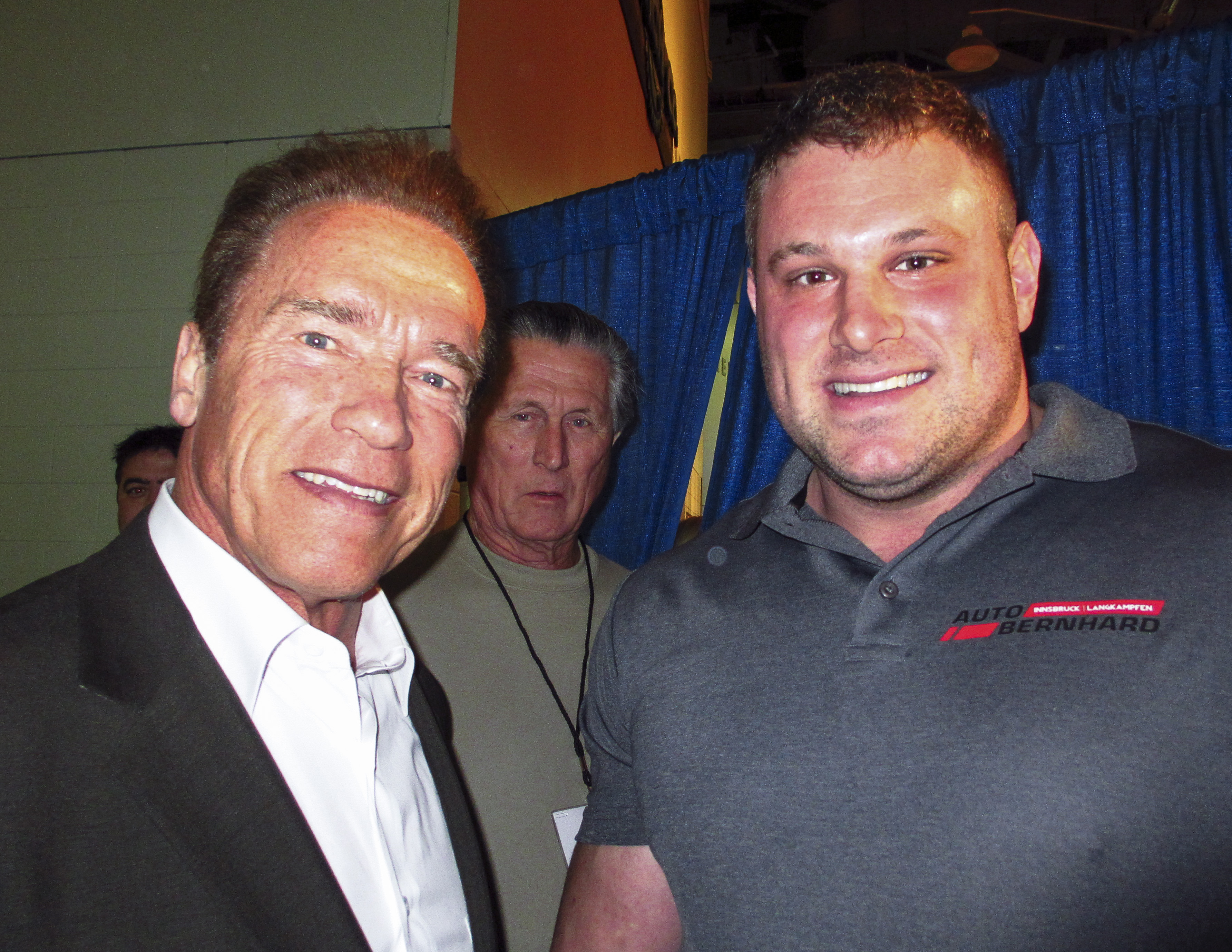 Die Legende Arnold Schwarzenegger und der Strongman Champions League World Champion Martin Wildauer beim Arnold Sport Festival 2015 in Columbus, Ohio, USA.